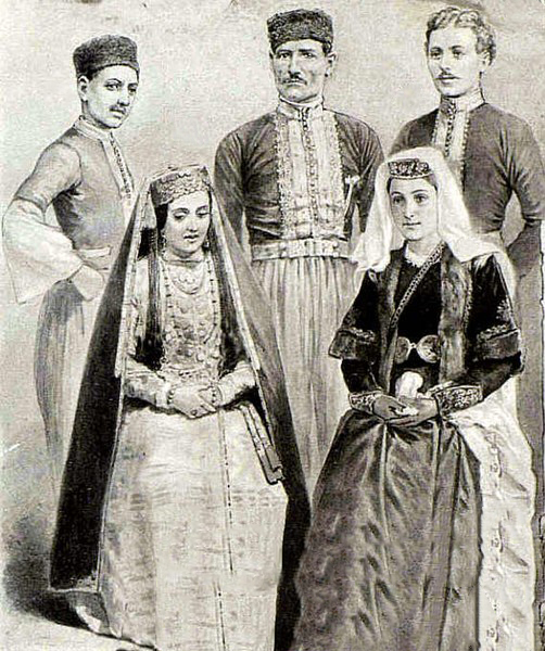 типажи крымских татар